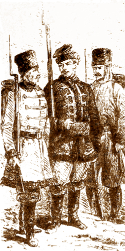 Powstanie Styczniowe (January Uprising - fizylierzy